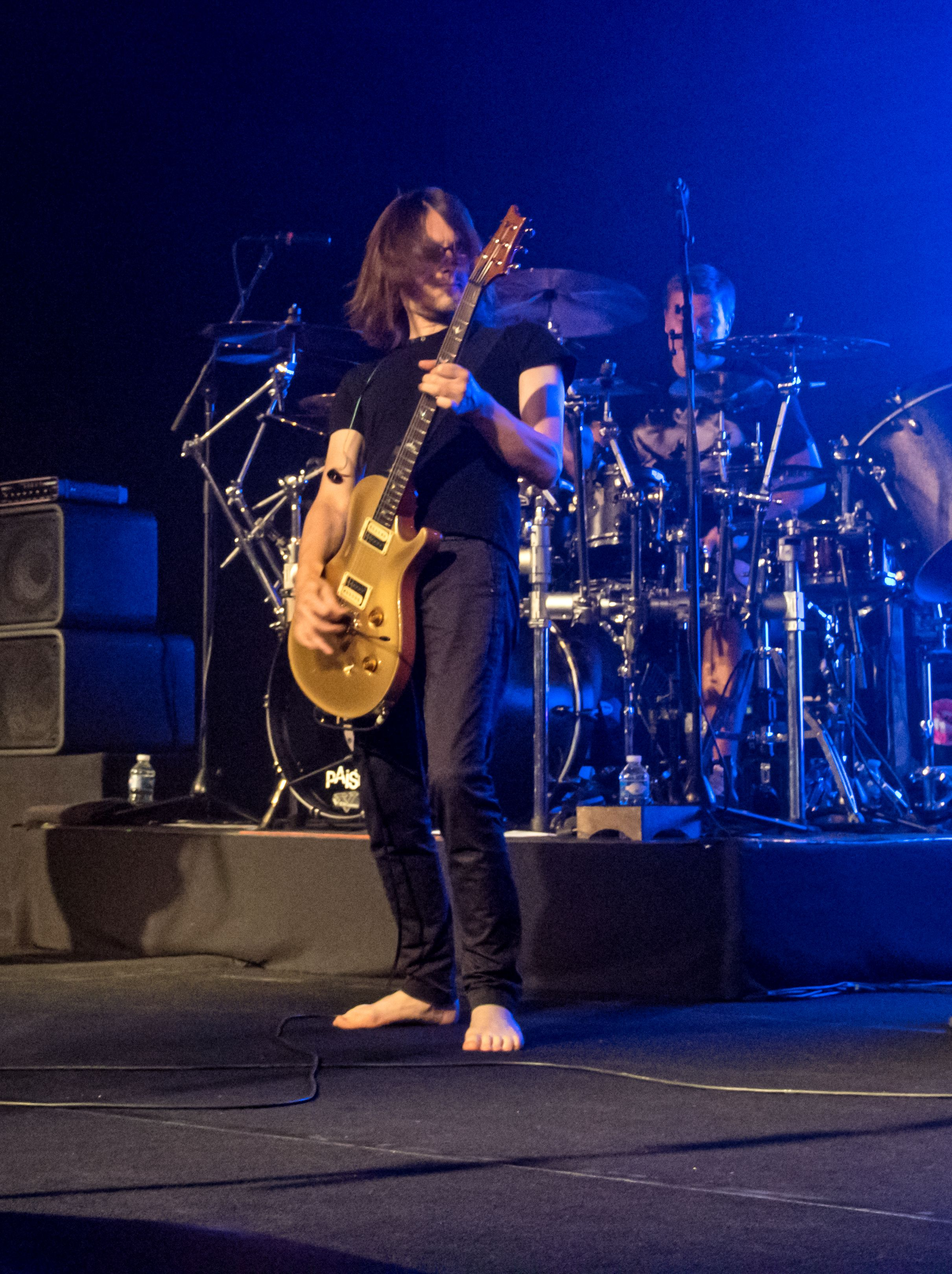 Bilder vom Zelt Musik Festival 2016 in Freiburg im Breisgau Steven Wilson